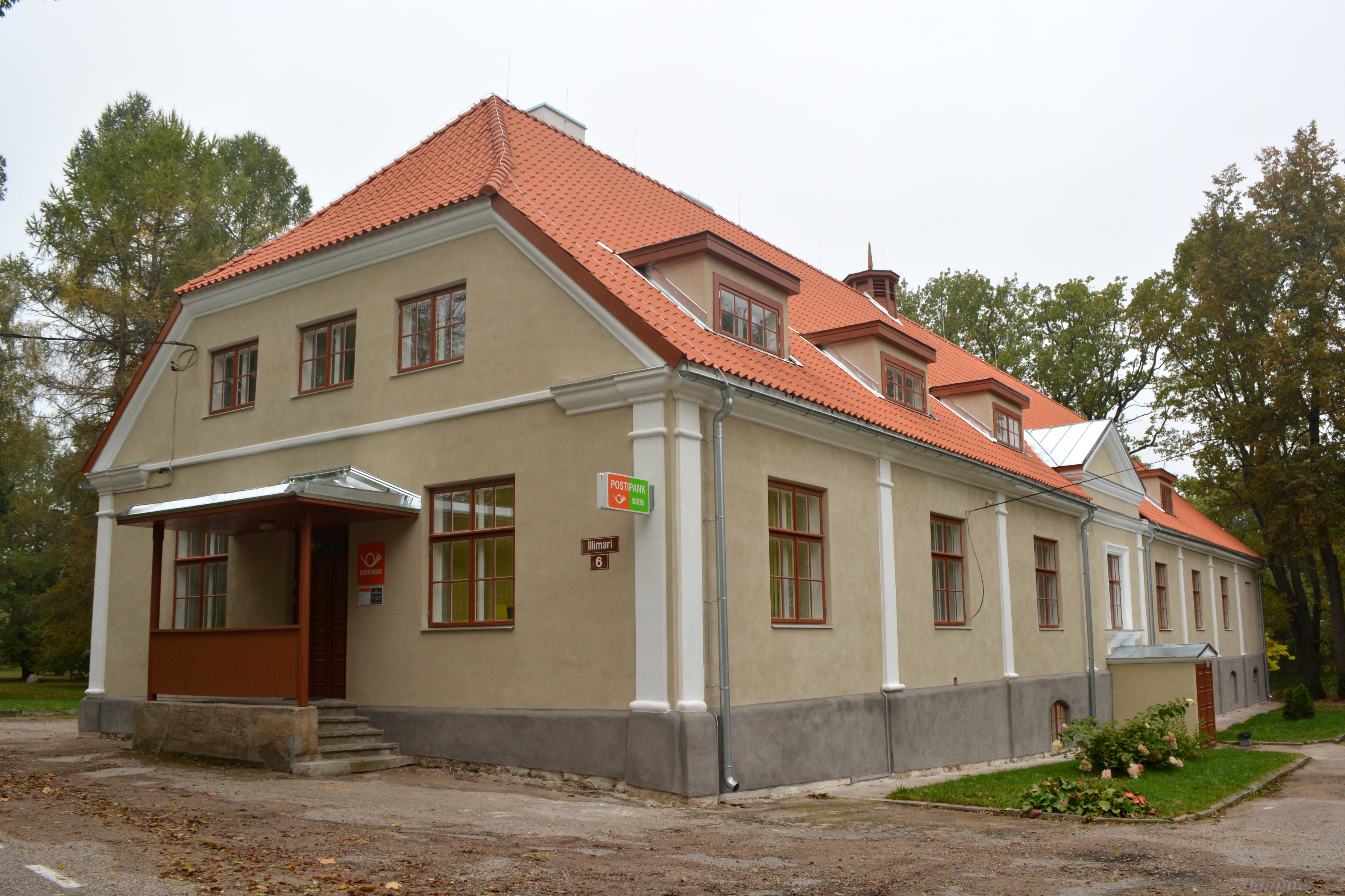 Ahja mõisa ait-kelder